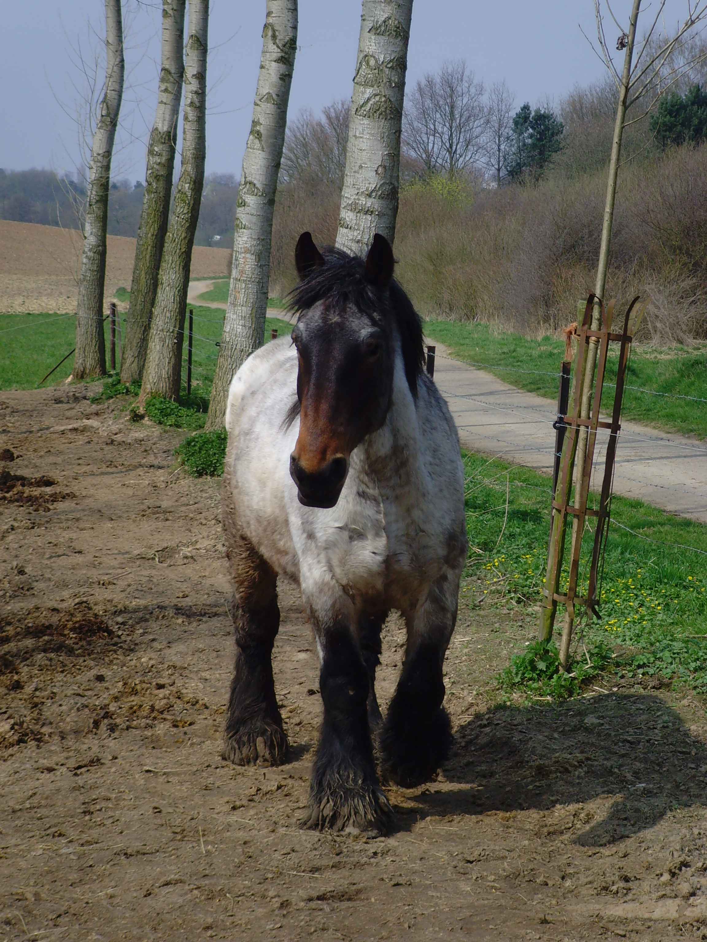 Belgisches Kaltblut